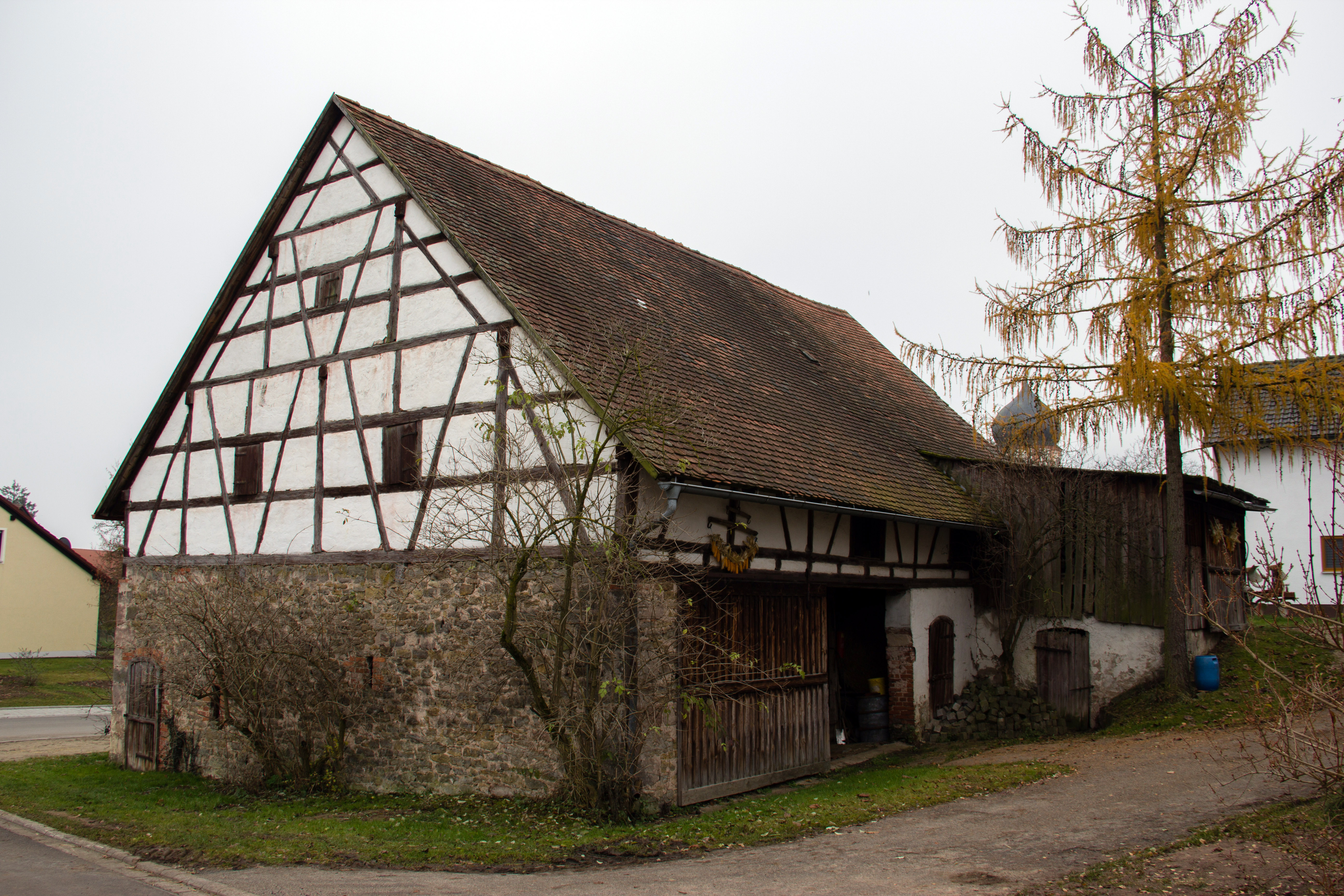 Jahrsdorf bei Hilpoltstein, Scheune